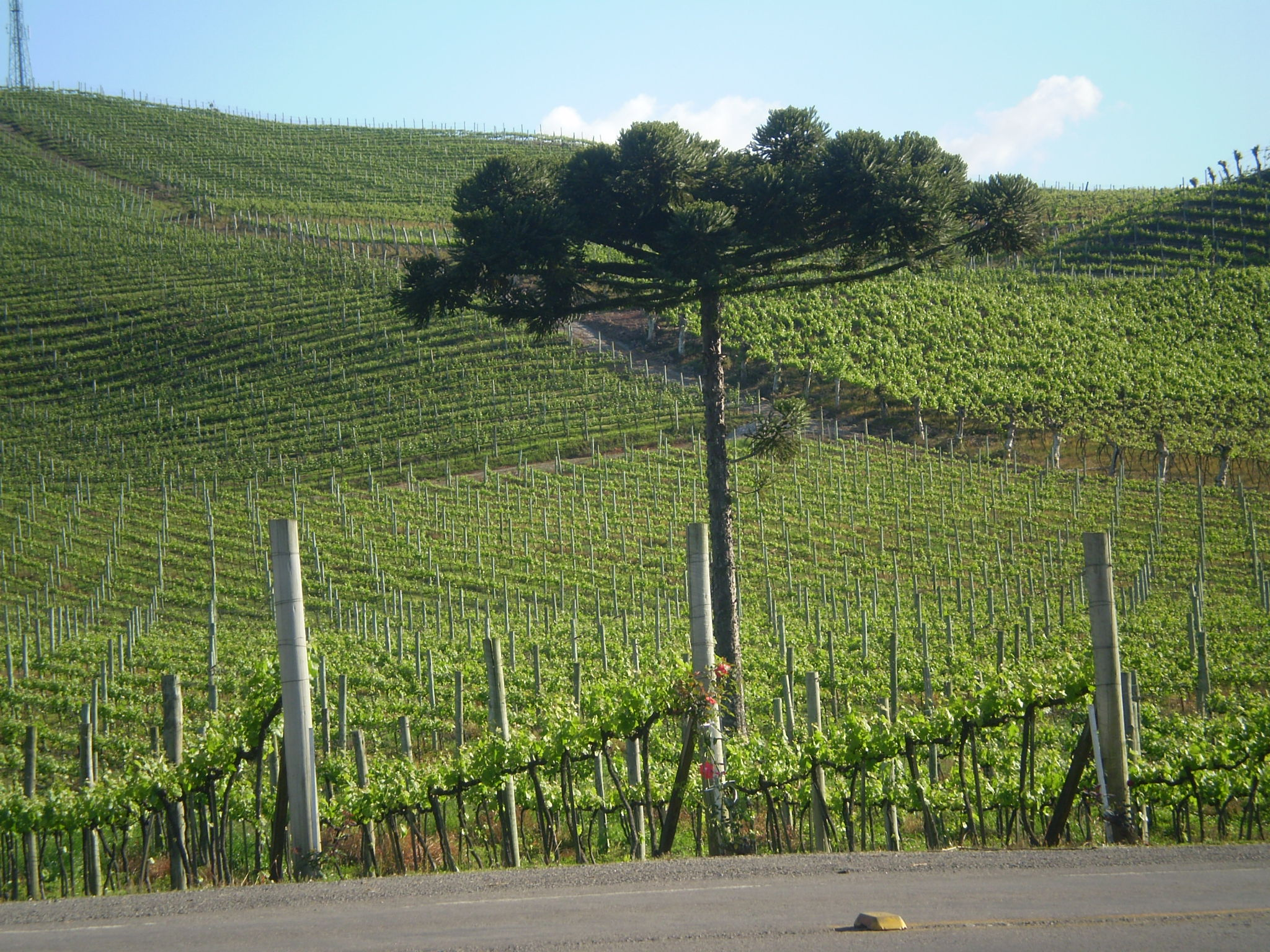 Vinhedos Miolo, Vale dos Vinhedos, RS-444.